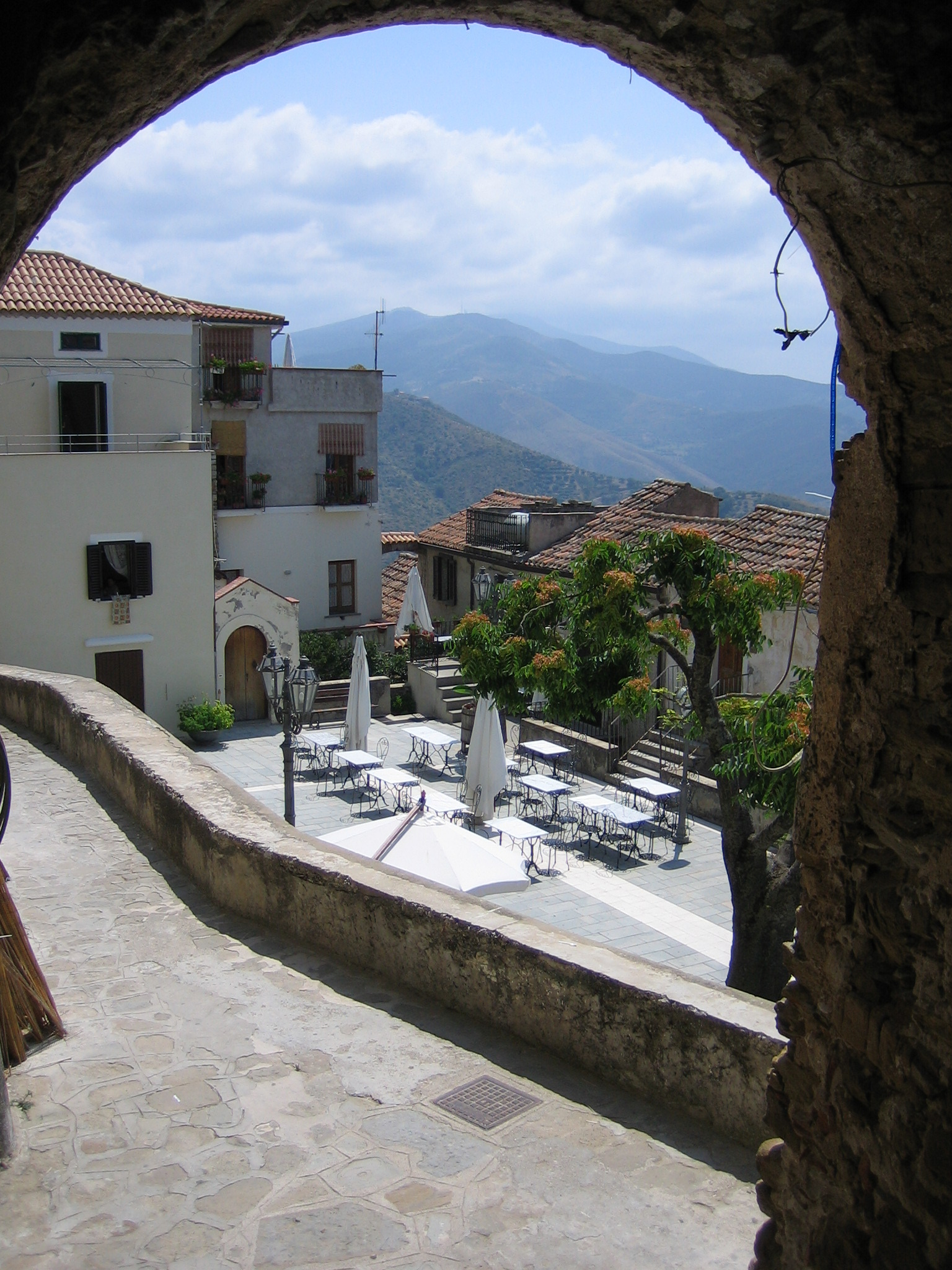 Platz in Castellabate, Kampanien, Italien